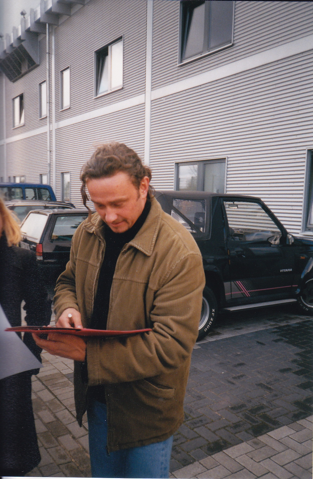 Musicaldarsteller Kristian Vetter in Oberhausen (2000)